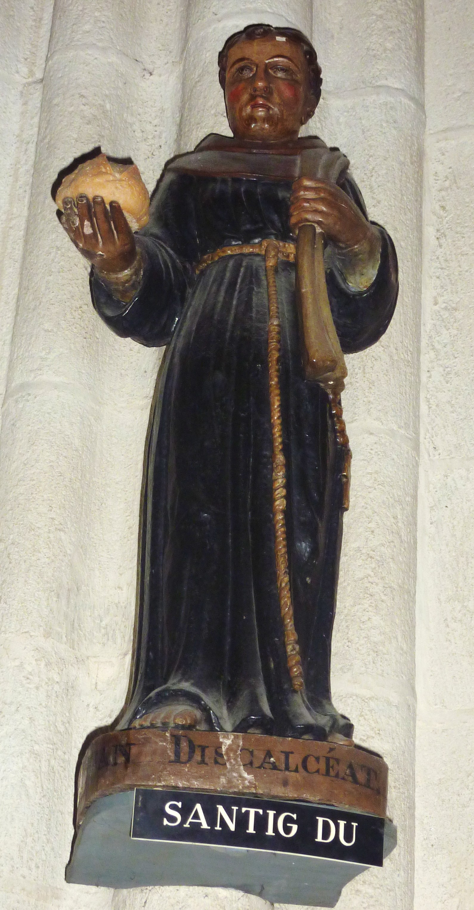 Statue de Santik Du [saint Jean Discaleat] dans la cathédrale Saint-Corentin de Quimper